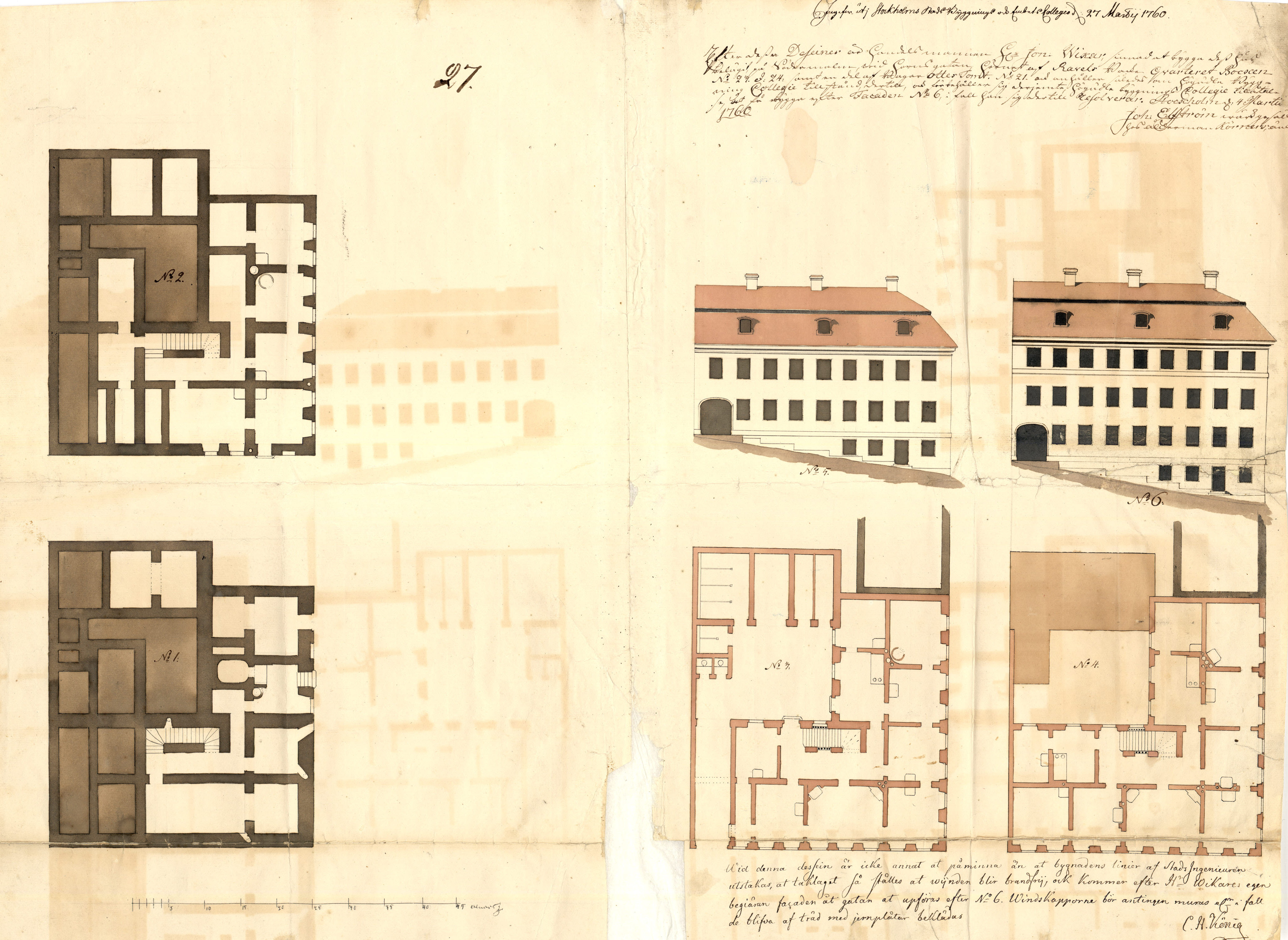 Nybyggnad Kv Stenbocken, Hornsgatan 26